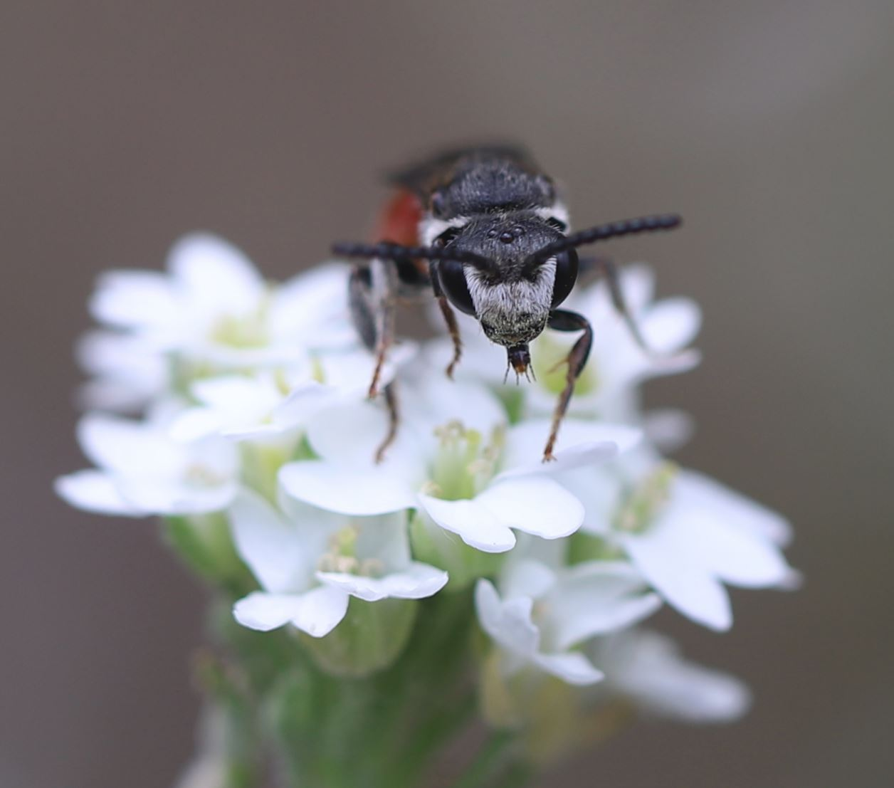 Blutbiene Sphecodes albilabris am 25. Juli 2020 in der Schwetzinger Hardt